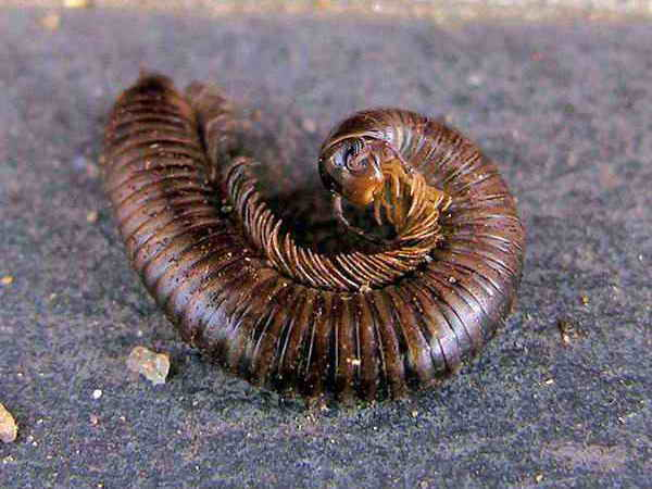 Foto tirada cunha Nikon E8800. Self made. Bastabales - Galicia - Spain